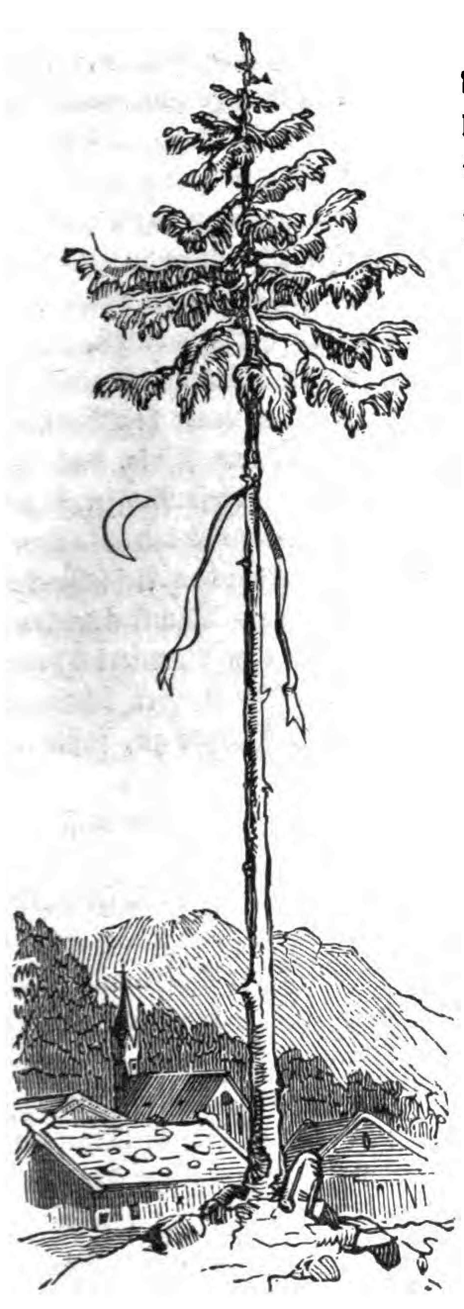 Berthold Auerbach, Schwarzwälder Dorfgeschichten, Befehlerles, Zeichnung von Mathias Artaria, 1848. – Der Maibaum, Zeichnung von Mathias Artaria.